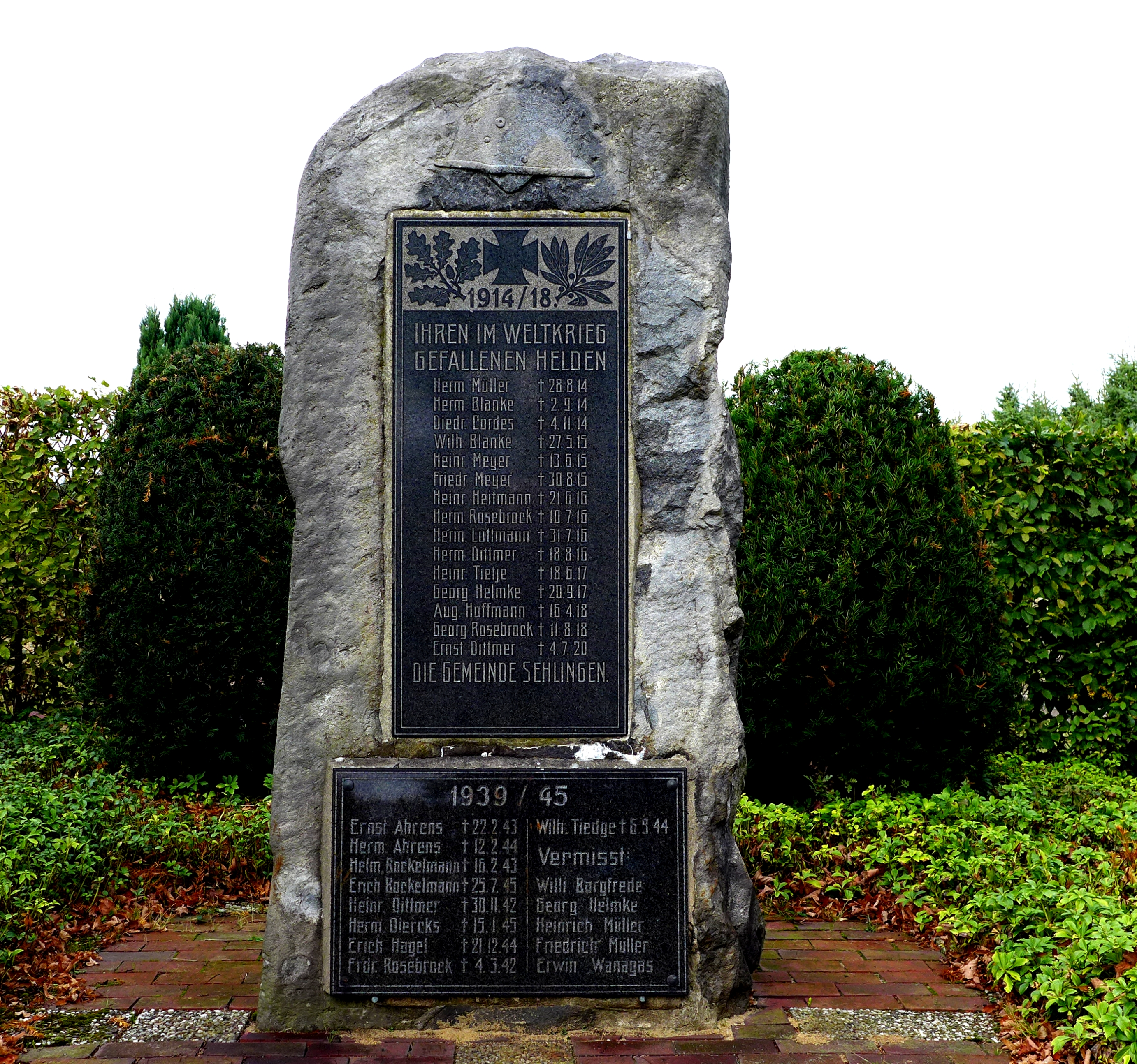 Auf dem Friedhof der Gemeinde Sehlingen im Landkreis Verden. 1914-18, Ihren im Weltkrieg gefallenen Helden; die Gemeinde Sehlingen. 1939-45, Gedenken der Gefallenen und Vermissten. Aufnahmedatum 2016-10.